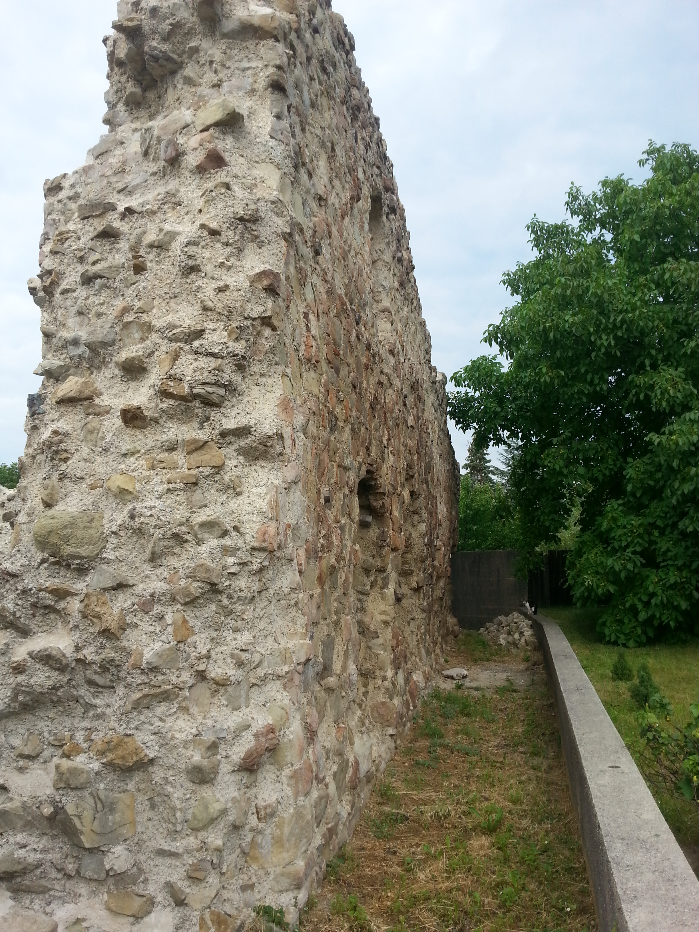 Burgus Zeiselmauer, Niederösterreich, Außenseite der Südmauer.